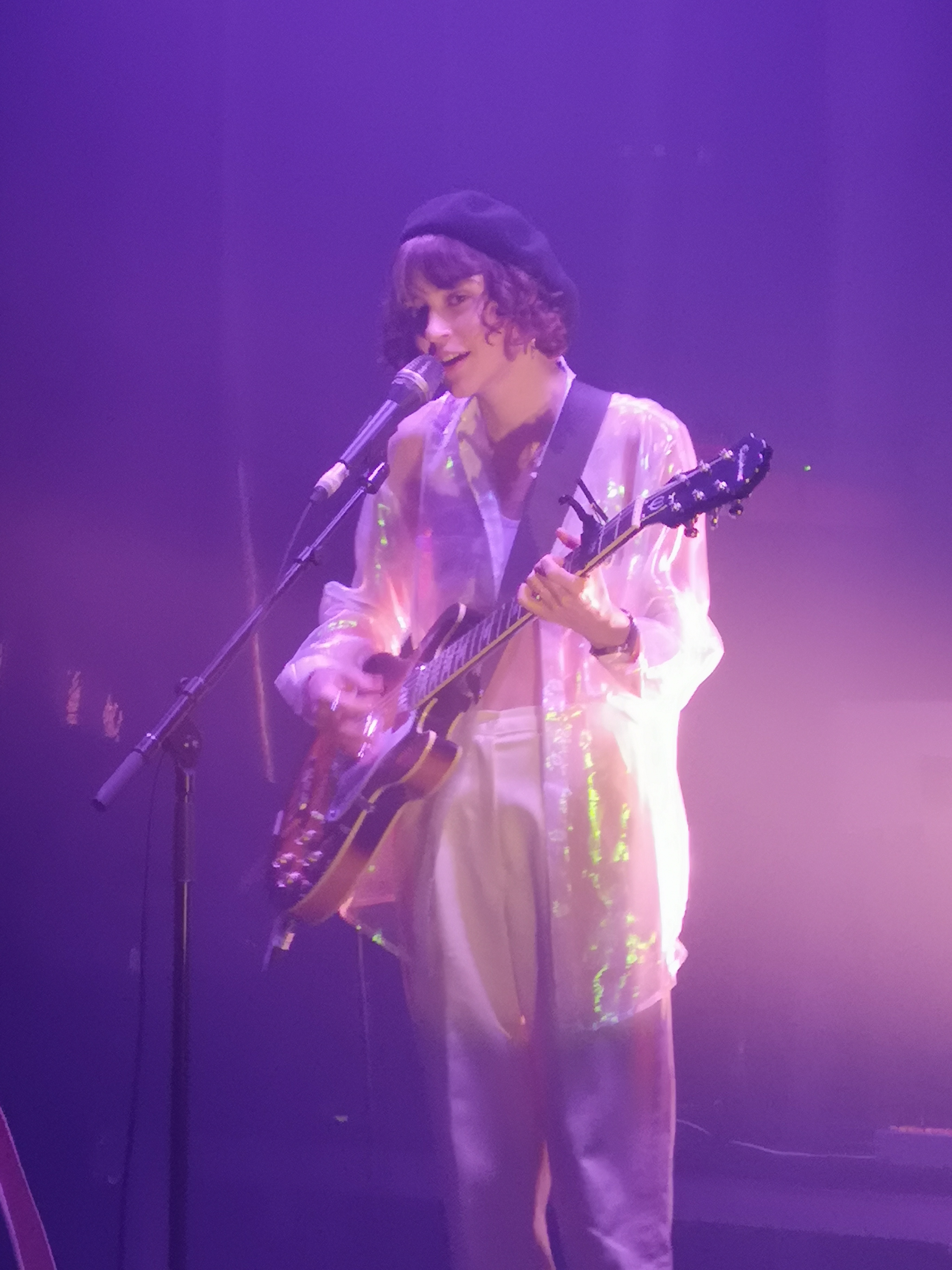 Pomme en concert à la Cigale, le 27 janvier 2020.